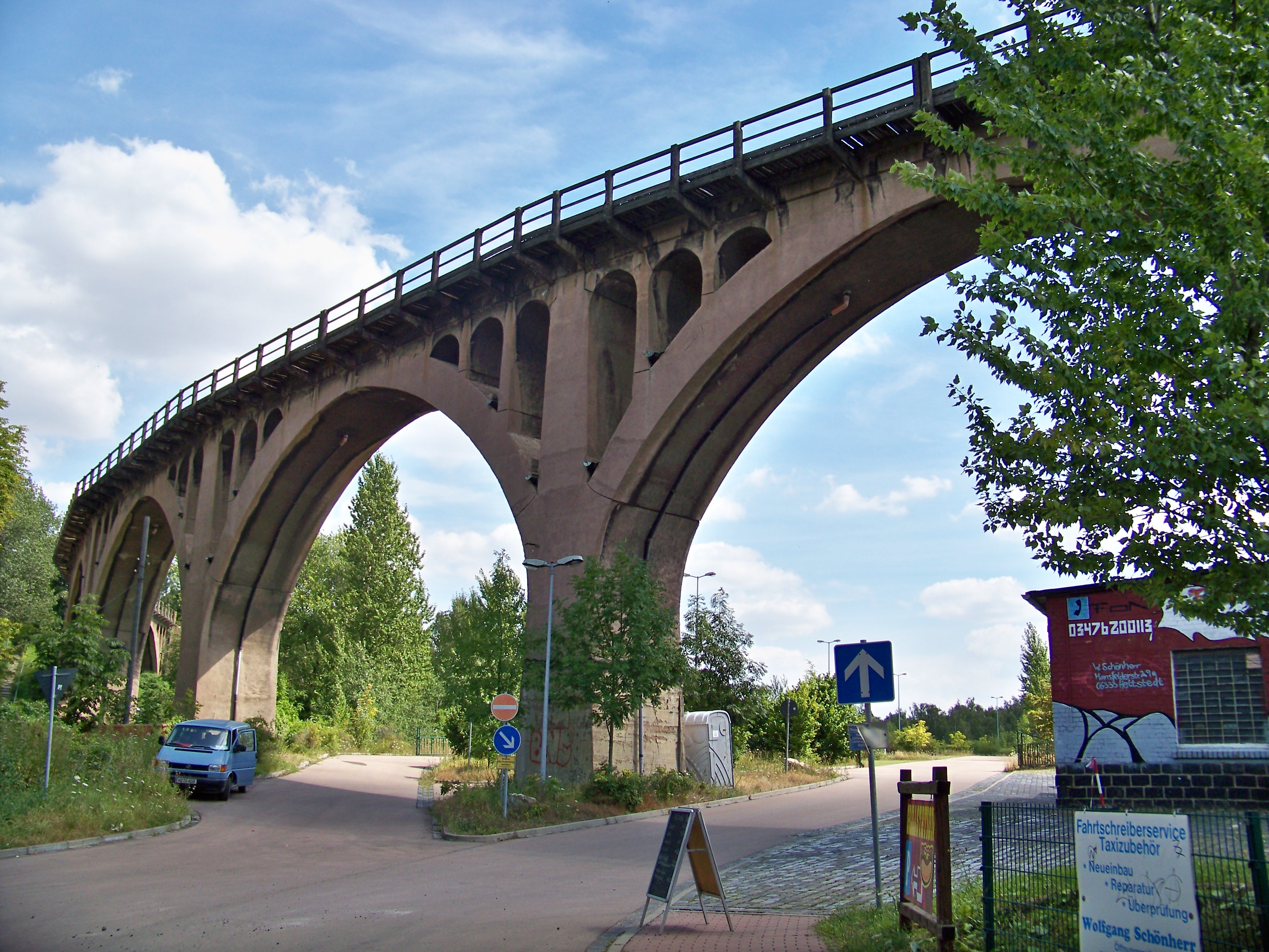 Schmalzgrund-Viadukt in Hettstedt